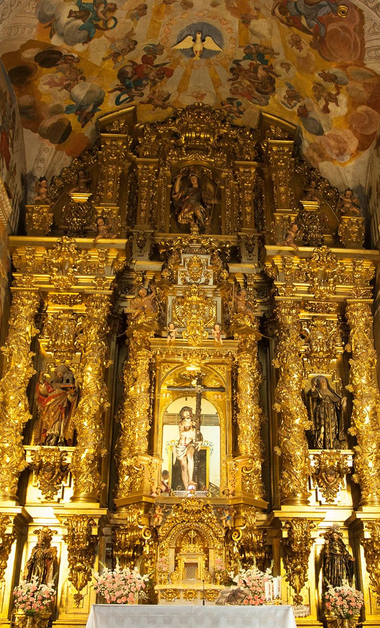 Retablo mayor serradillano